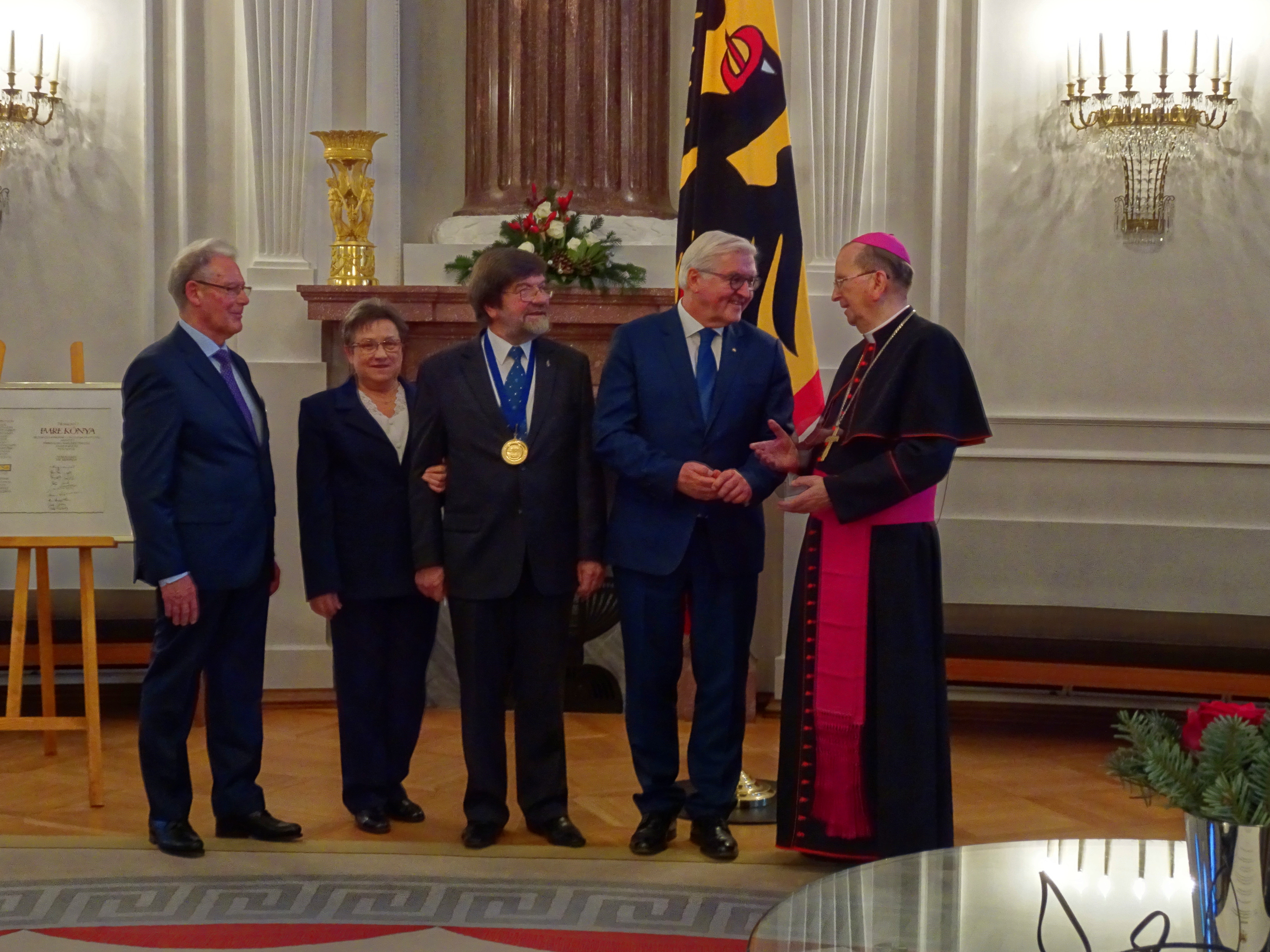 Übergabe des Adalbert-Preises 2017 in Schloss Belevue Berlin; v.L. Prof.Dr.Hans Süssmuth, Frau Kóny, Dr. Imre Kónya, Bundespräsident Steinmeier, Erzbischof Muszynski